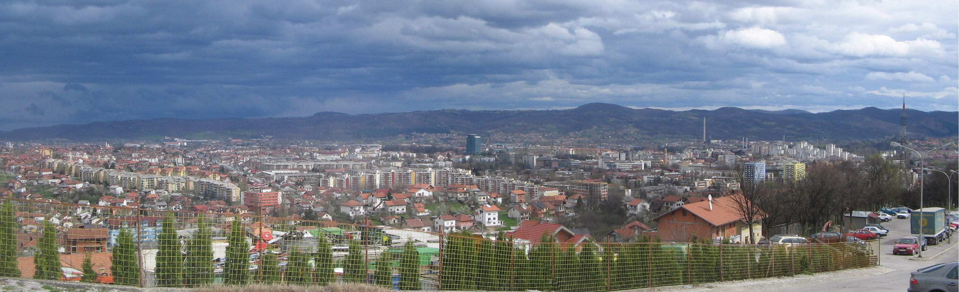 Banja Luka, pogled sa Novog groblja.